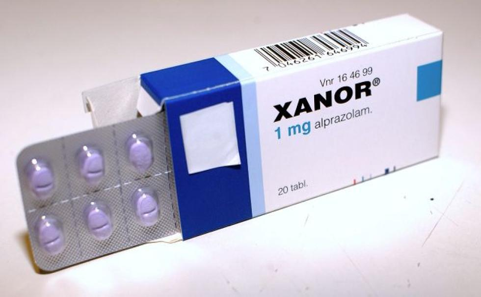 Bildet ovenfor viser en pakke med (Alprazolam) Xanor tabletter.